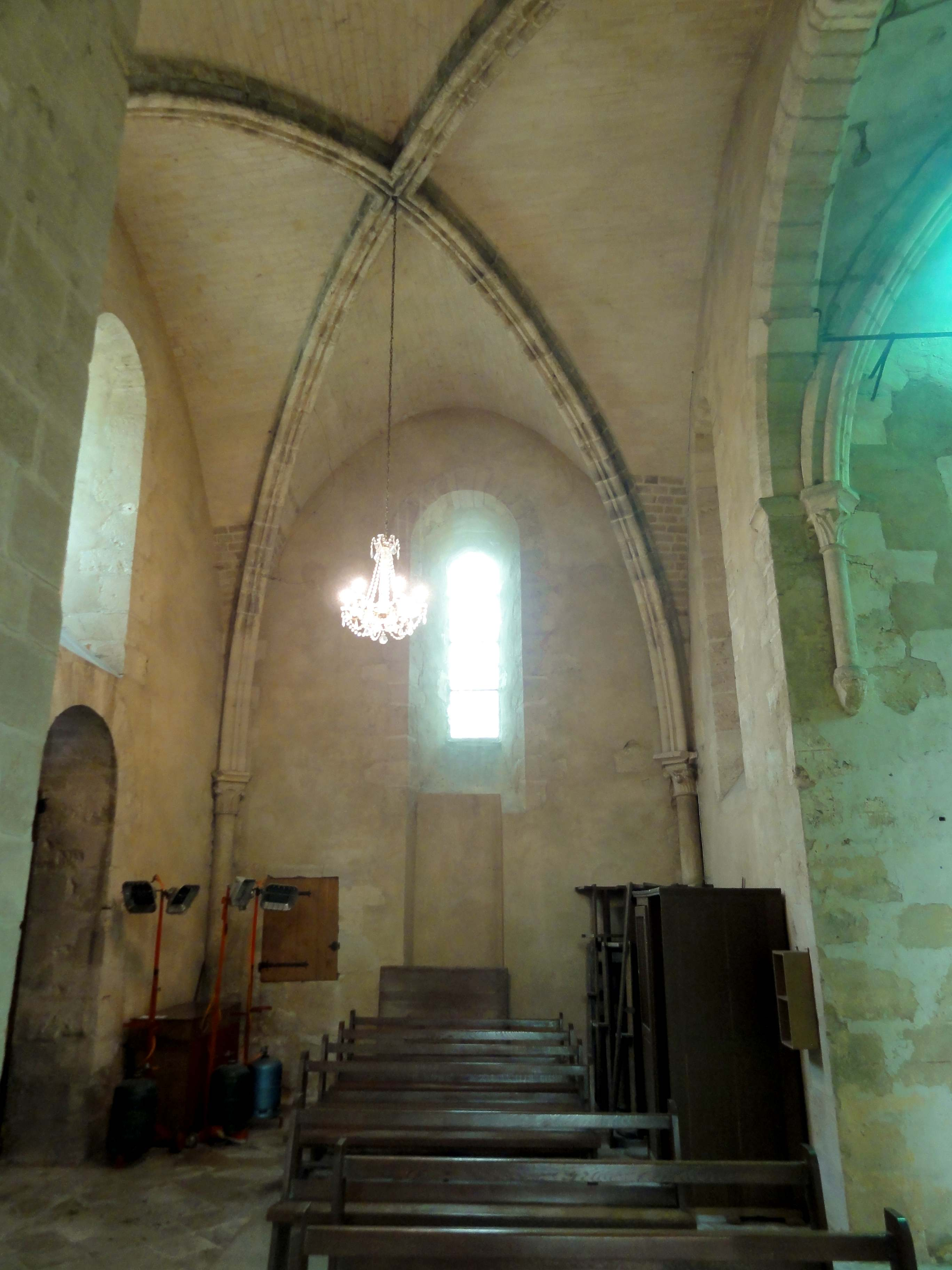 Intérieur de l'église (voir titre).